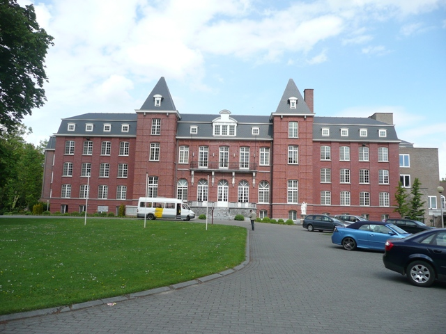 boterstraat_06_1